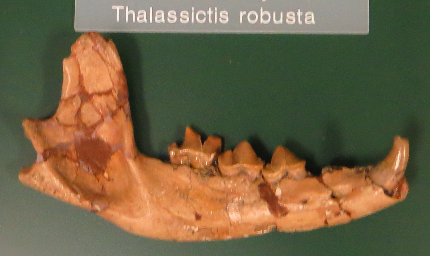 Fossil - Took the picture at Natural History Museum, Karlsruhe